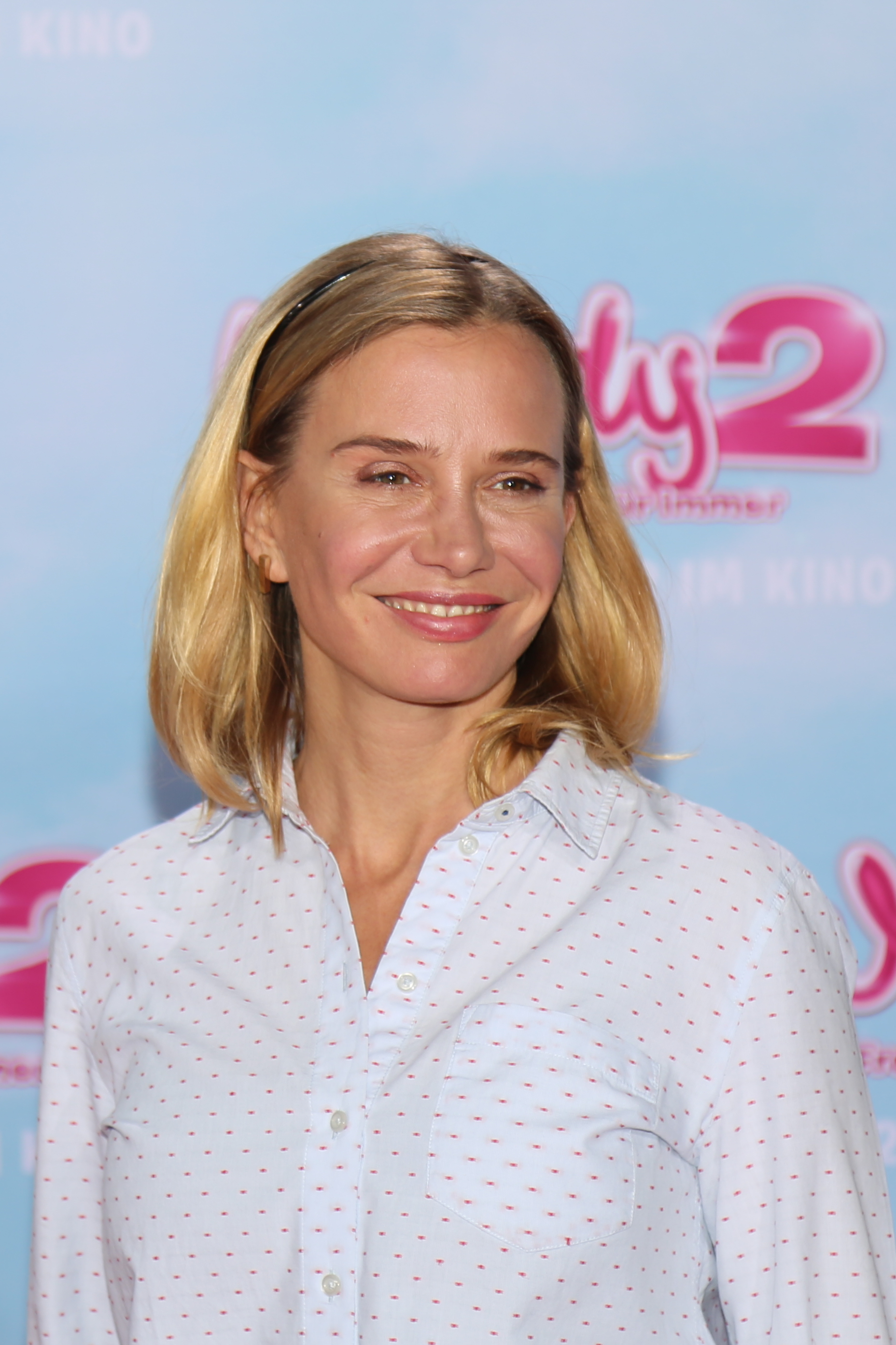 Nadeshda Brennicke bei der Premiere von Wendy 2, im Februar 2018.